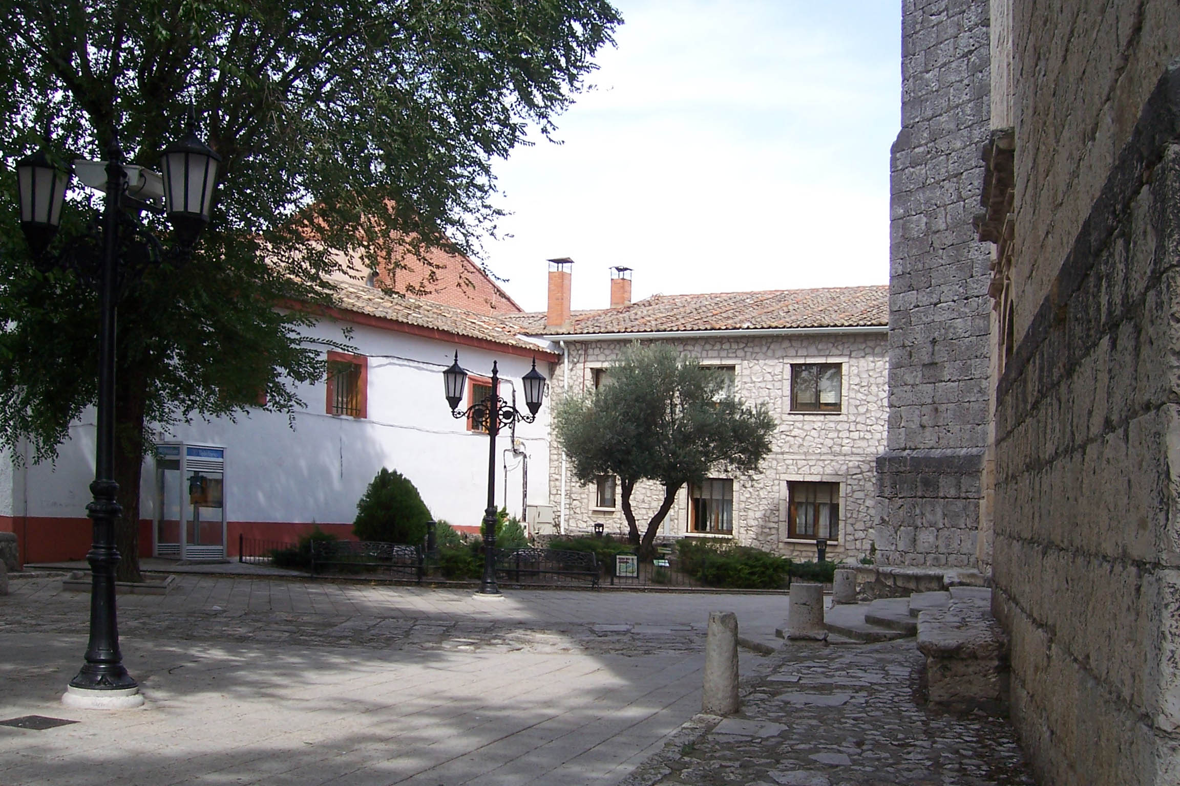 Aldeamayor de San Martín (Valladolid, España). Plaza delante de la parroquia de San Martín.